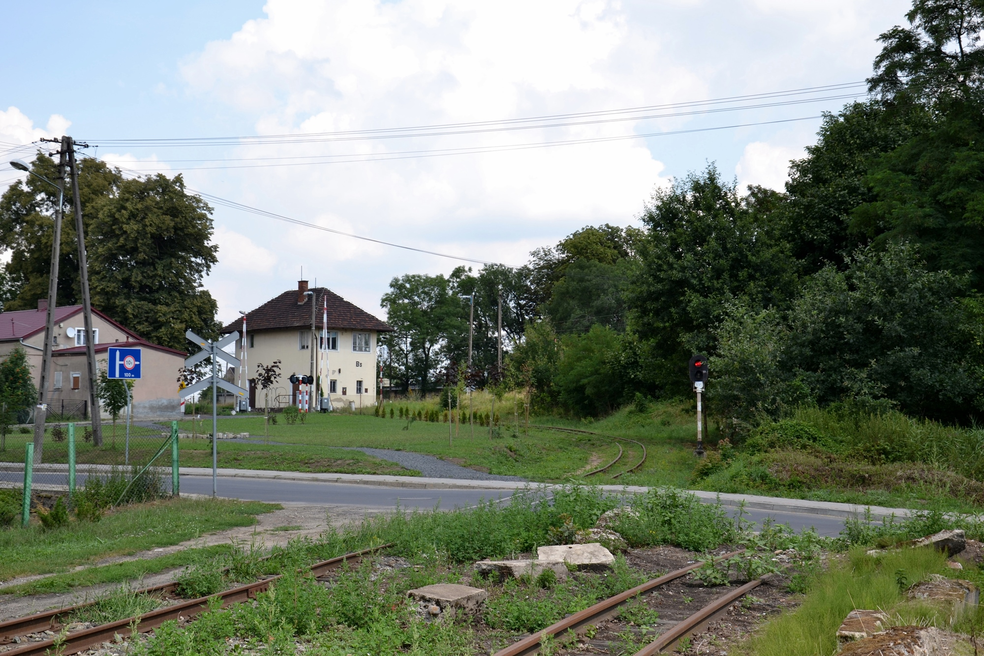 Widok na tor dojazdowy do stacji normalnotorowej Stare Bojanowo ze stacji Stare Bojanowo Wąsk.